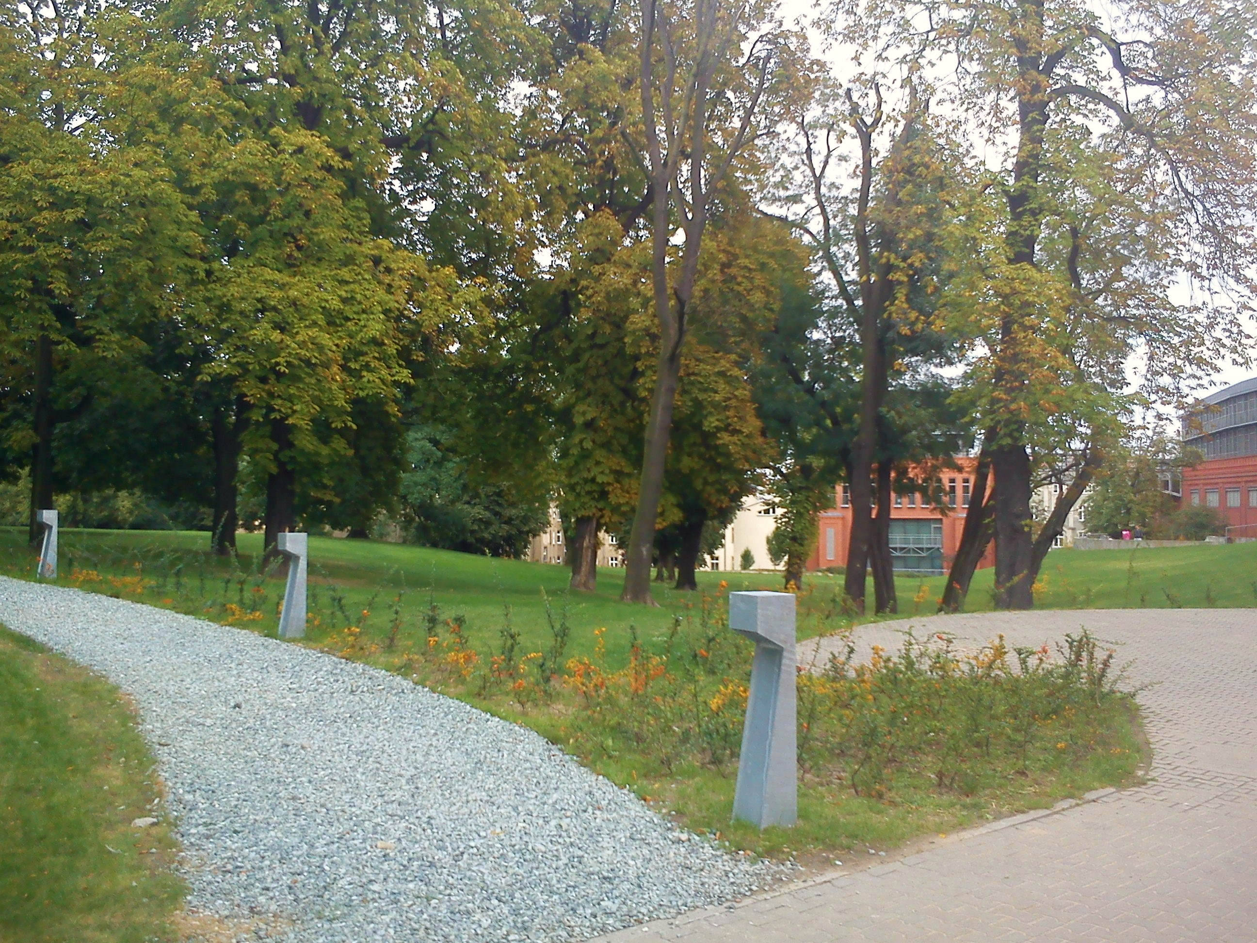 Dabrowskiego Park, Poznan